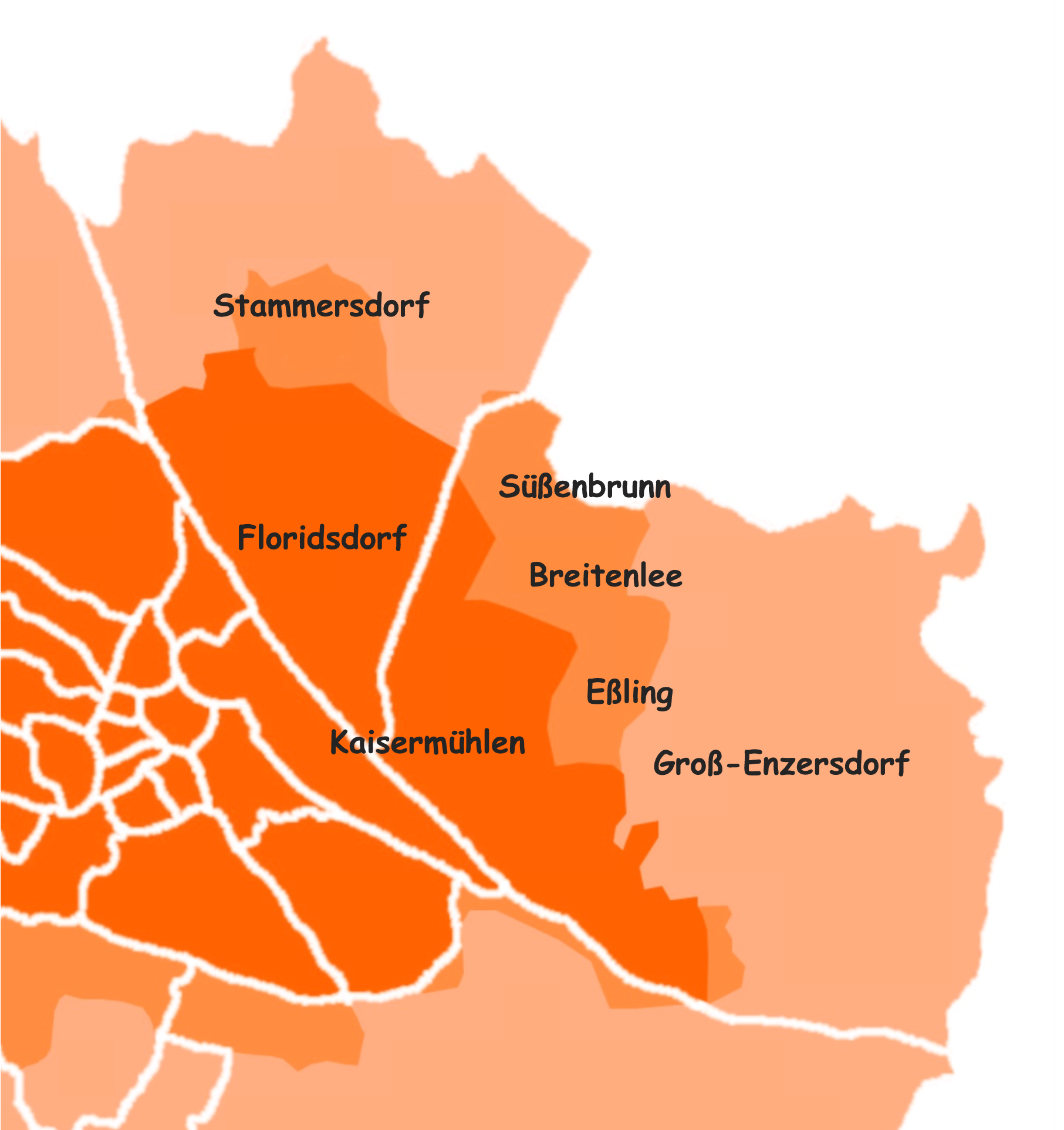 Karte von Groß-Wien (Detail)